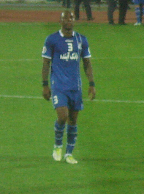 Jlloyd Samuel, Esteghlal-Al Ain, 2013 AFC Champions League